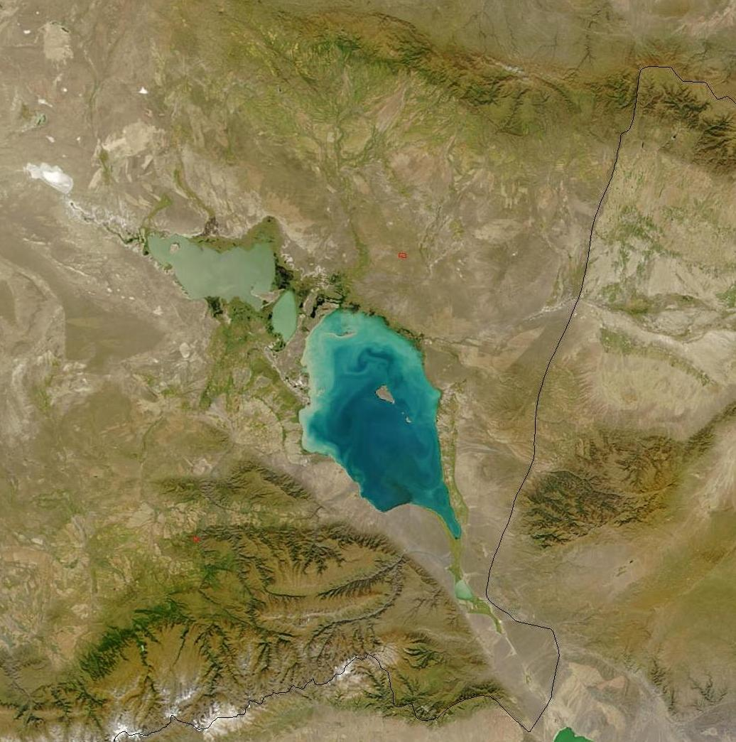 озеро Алаколь и Сасыкколь